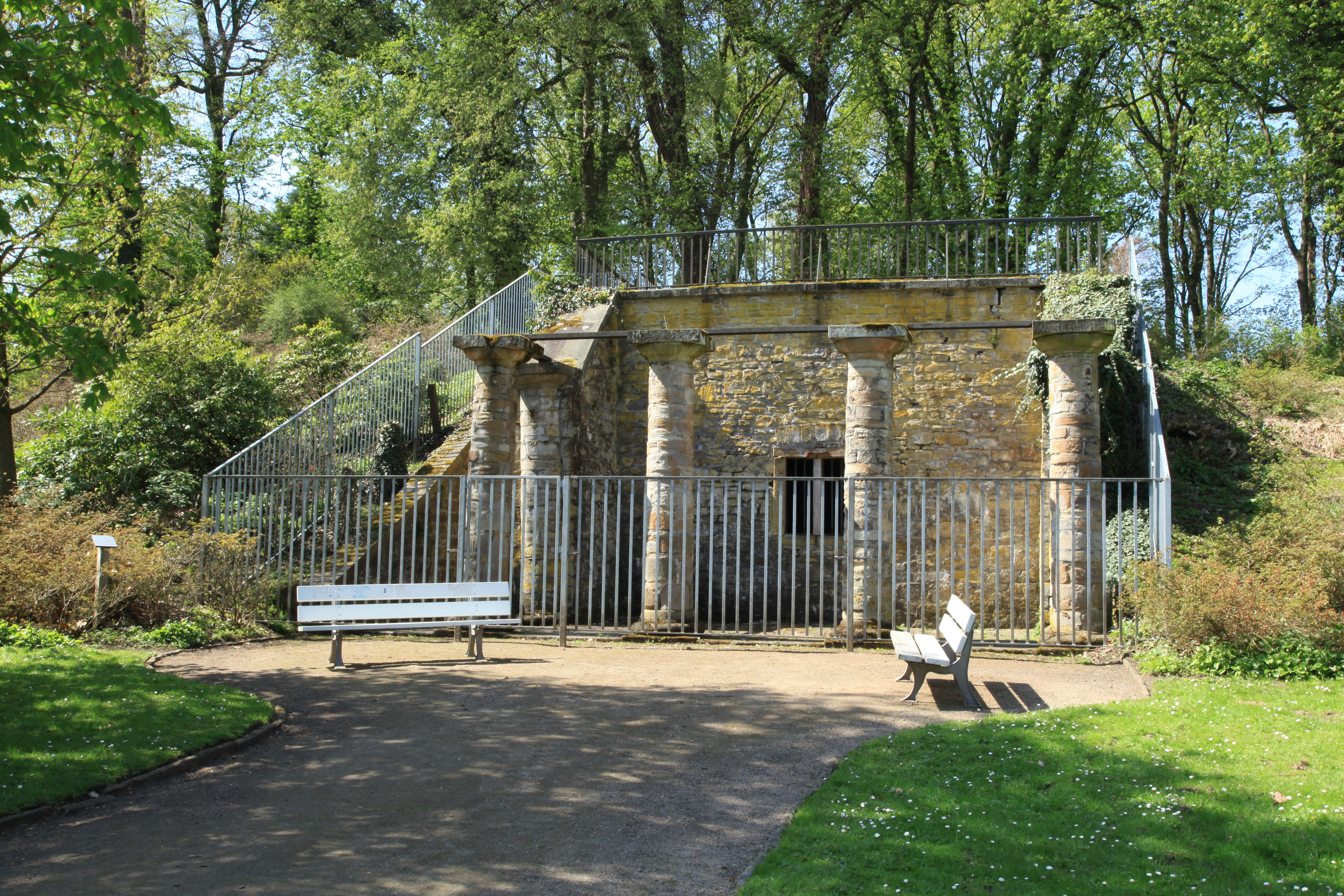 Eiskeller von Schloss Brünninghausen im Rombergpark in Dortmund